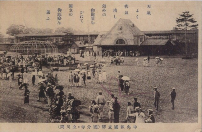 開業初期の中央線国立駅